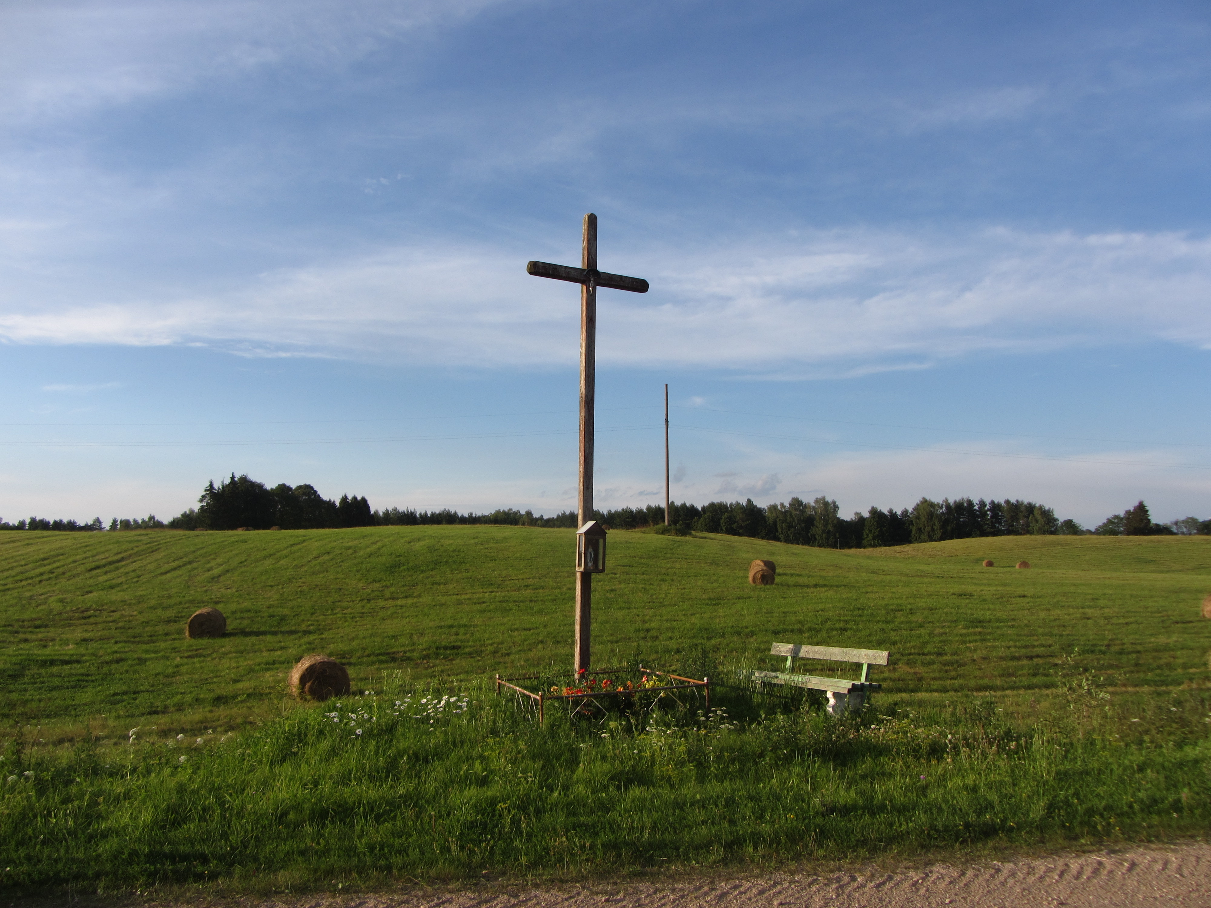 Dubingių sen., Lithuania